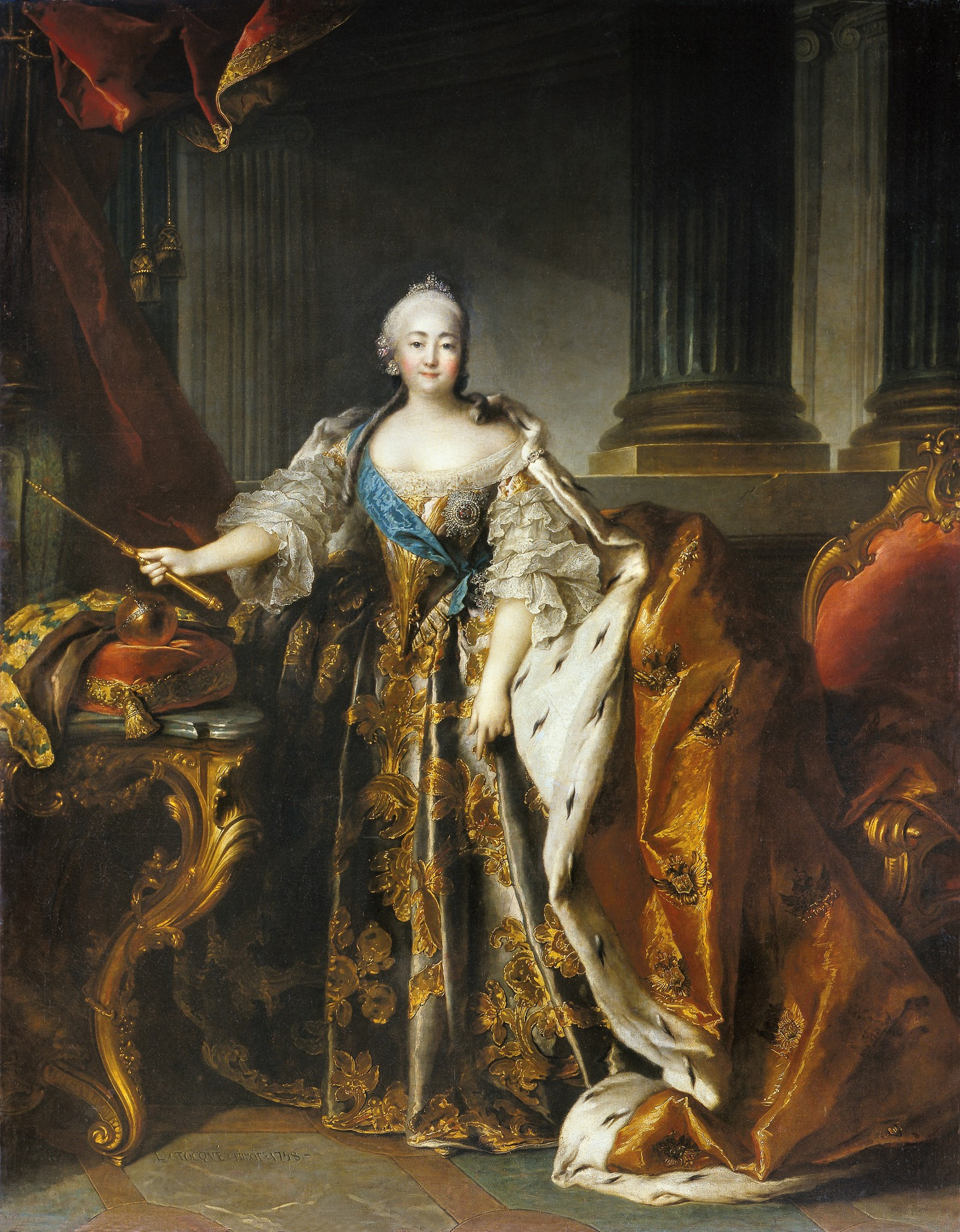 ГЭ-1280